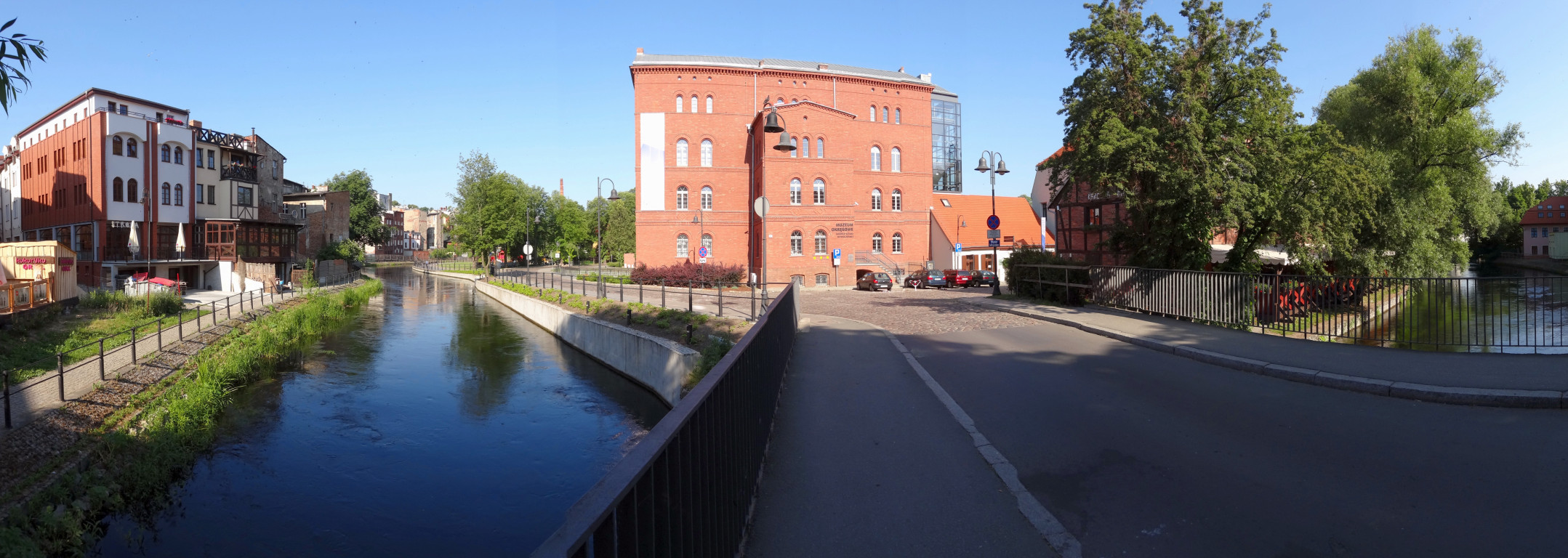 Rzeka Młynówka opływająca Wyspę Młyńską w Bydgoszczy w rejonie mostu Młyńskiego